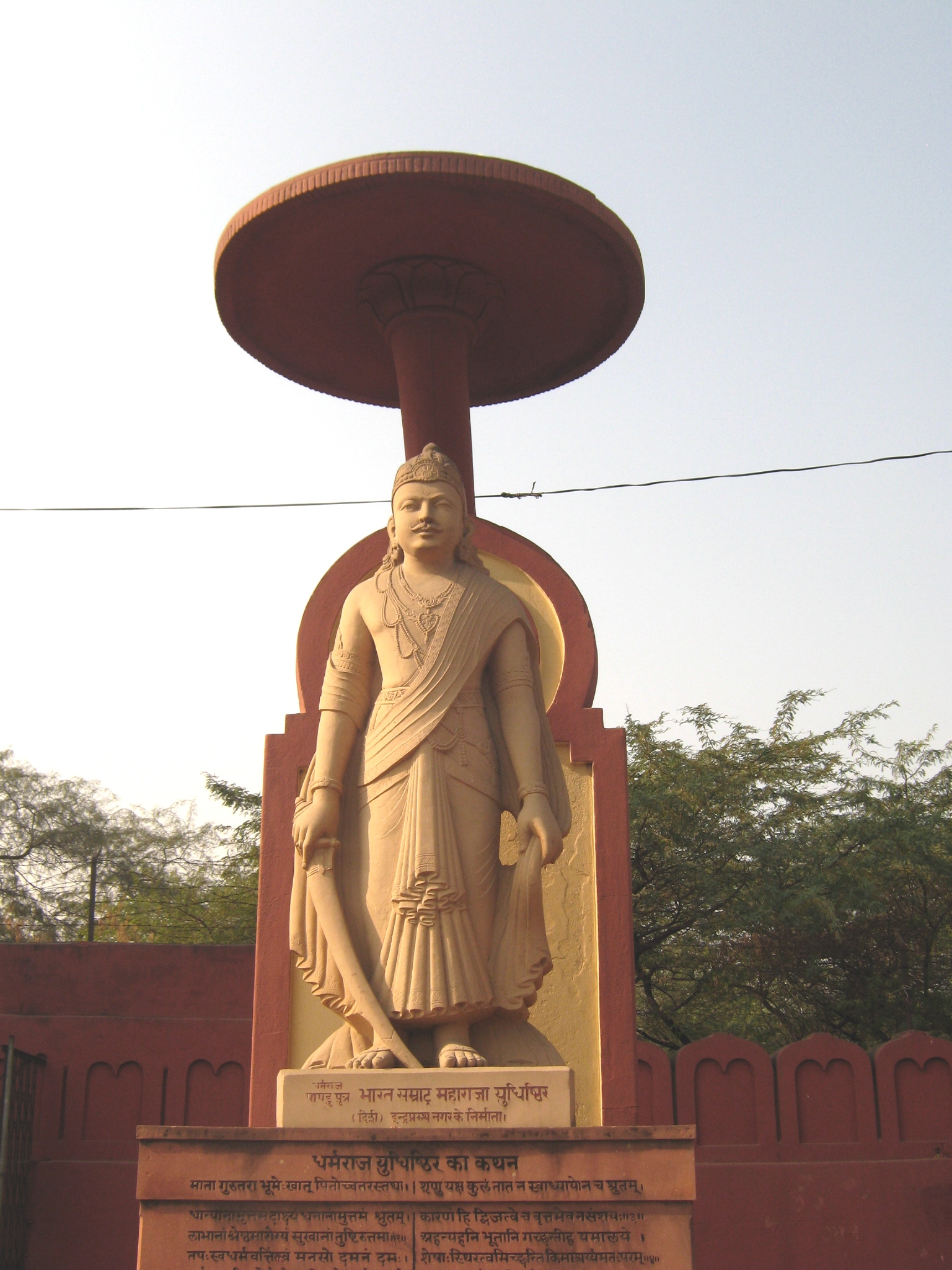 बिरला मंदिर, दिल्ली में एक शैल चित